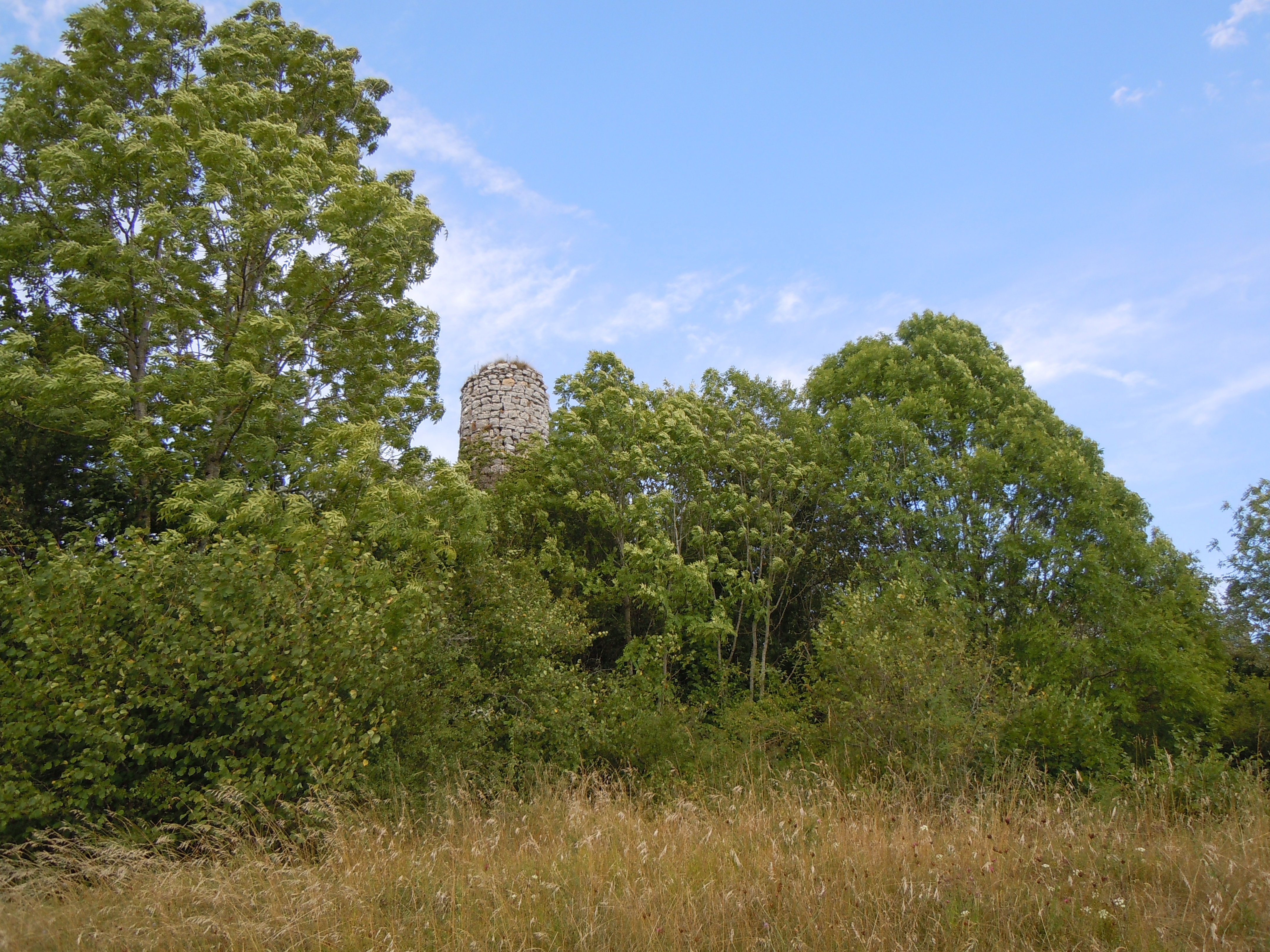 Château de Mauchamp - Saint-Maurice-de-Rotherens - Savoie